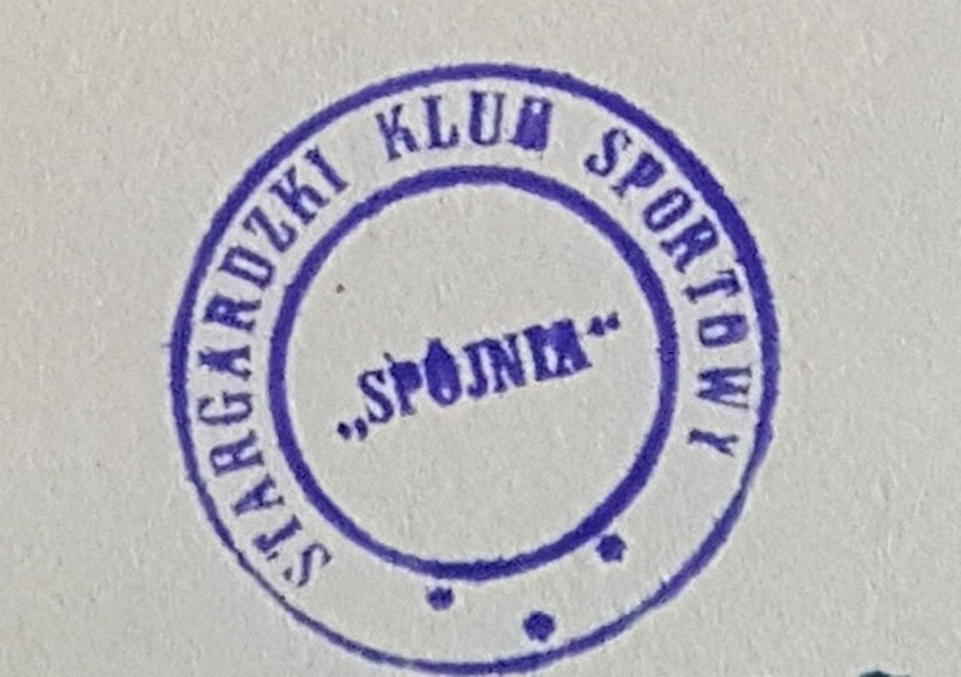 Pieczęć klubowa 1984